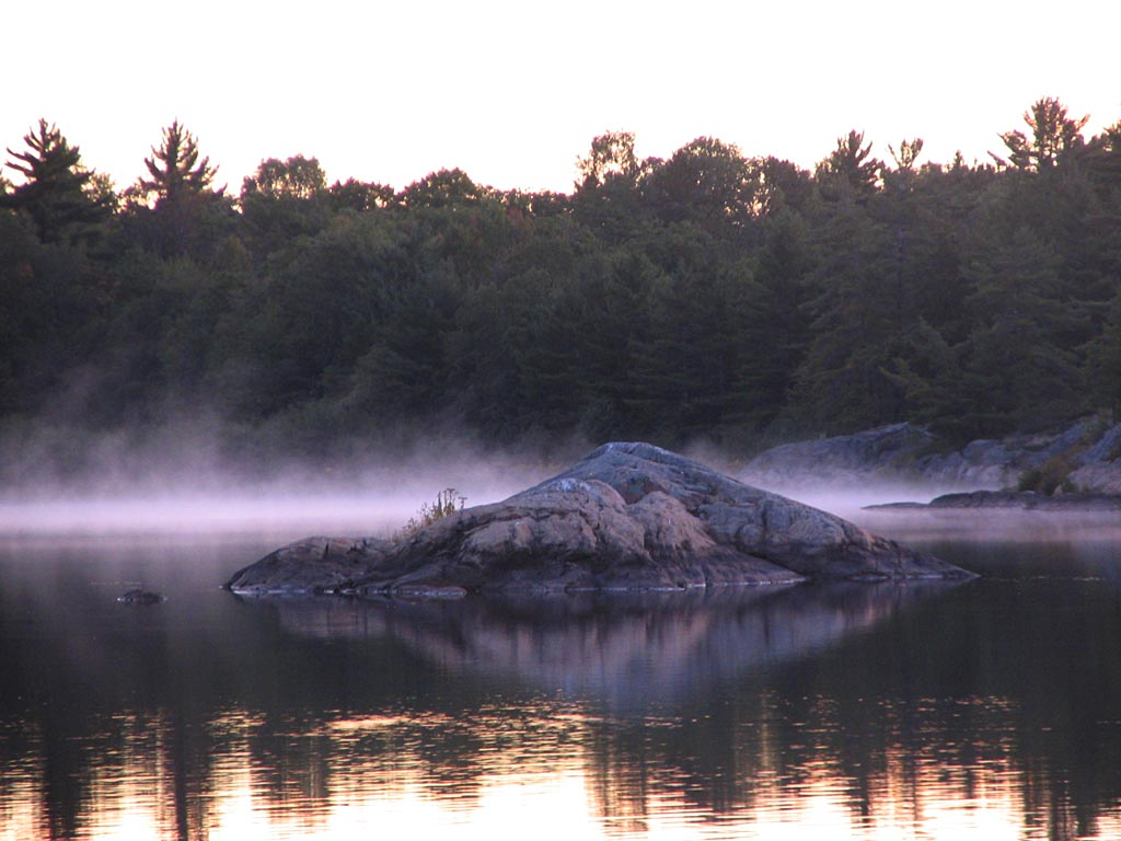 Moon Island, Massasauga Provincial Park